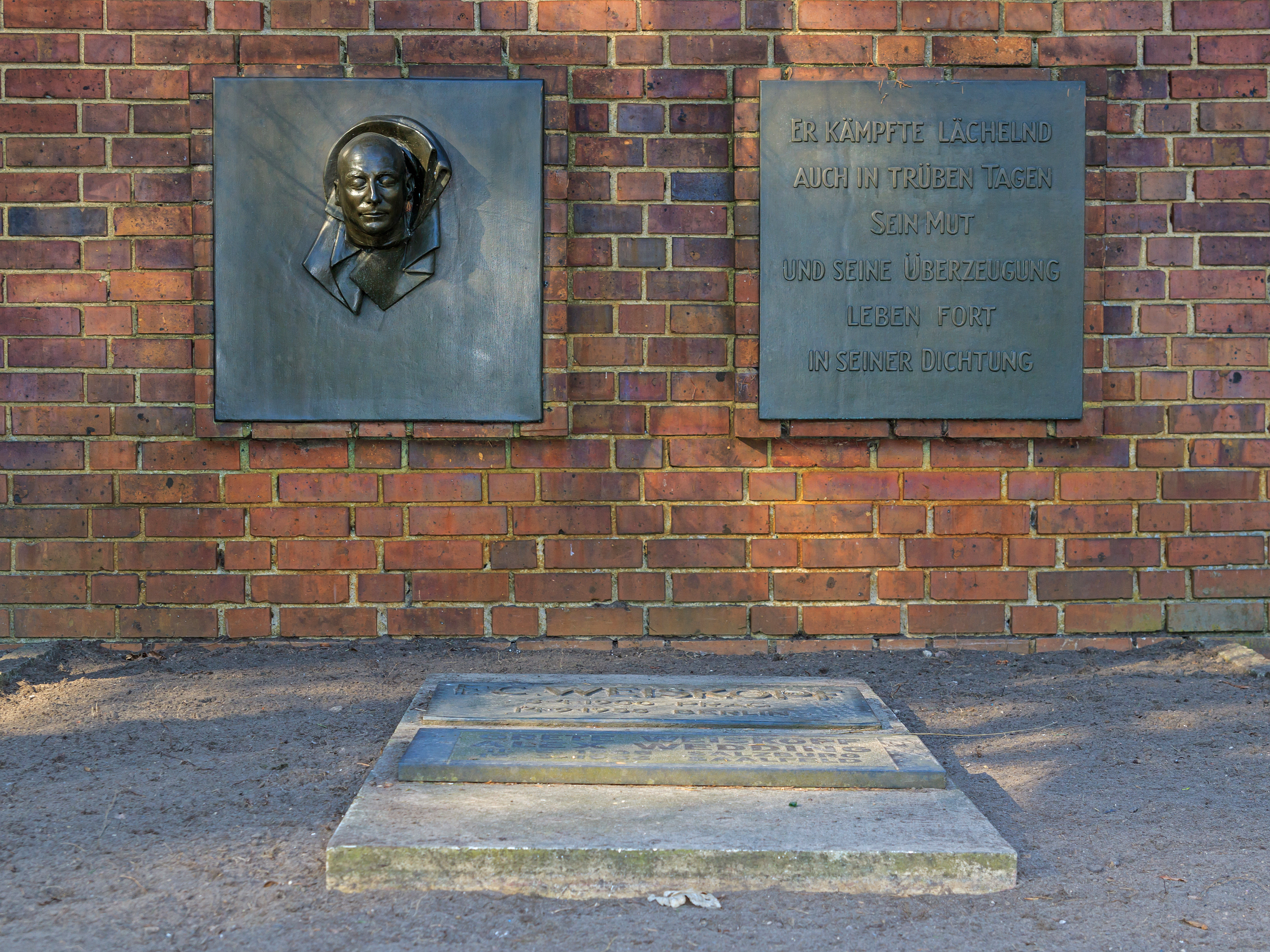 Zentralfriedhof Friedrichsfelde, Berlin-Lichtenberg. Grab von Alex Wedding (Grete Weiskopf) / Franz Carl Weiskopf.